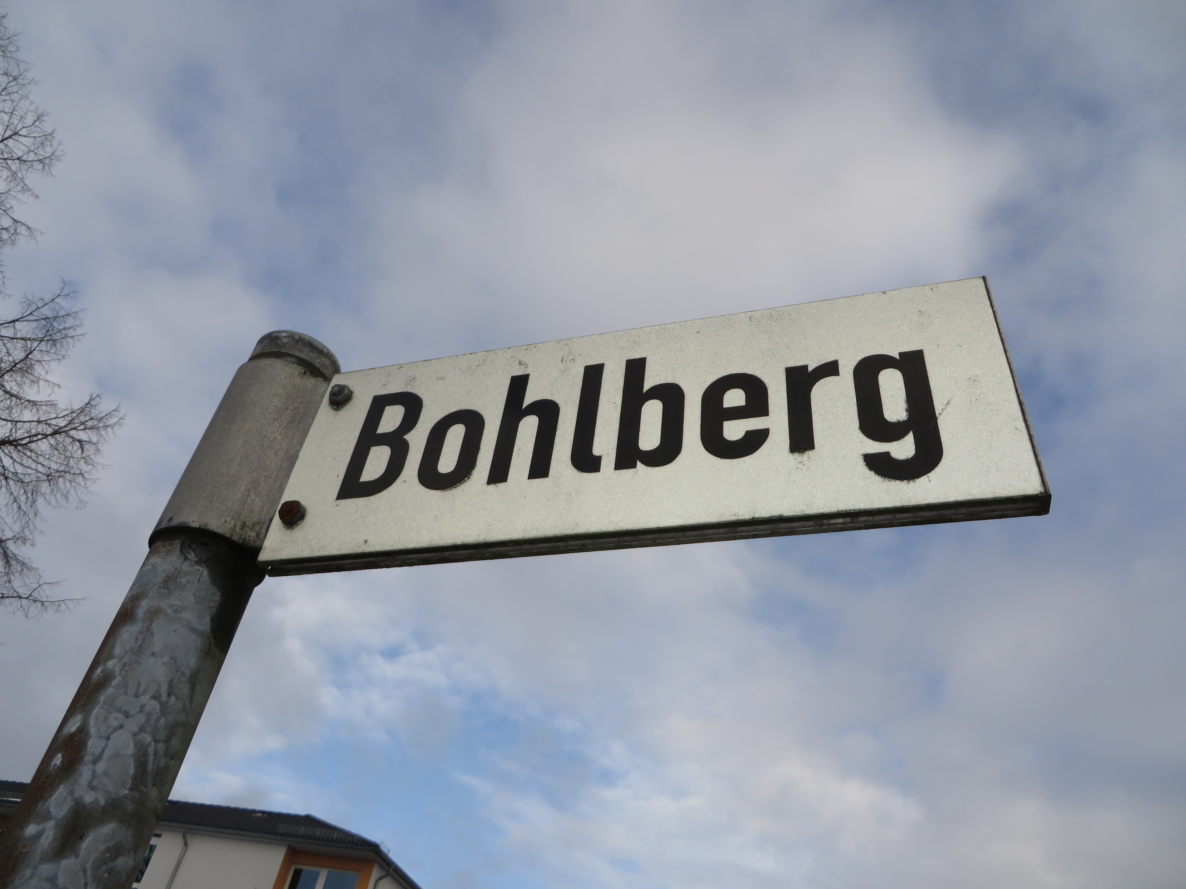 Straßenschild Bohlberg (Flensburg-Fruerlund), Bild 01